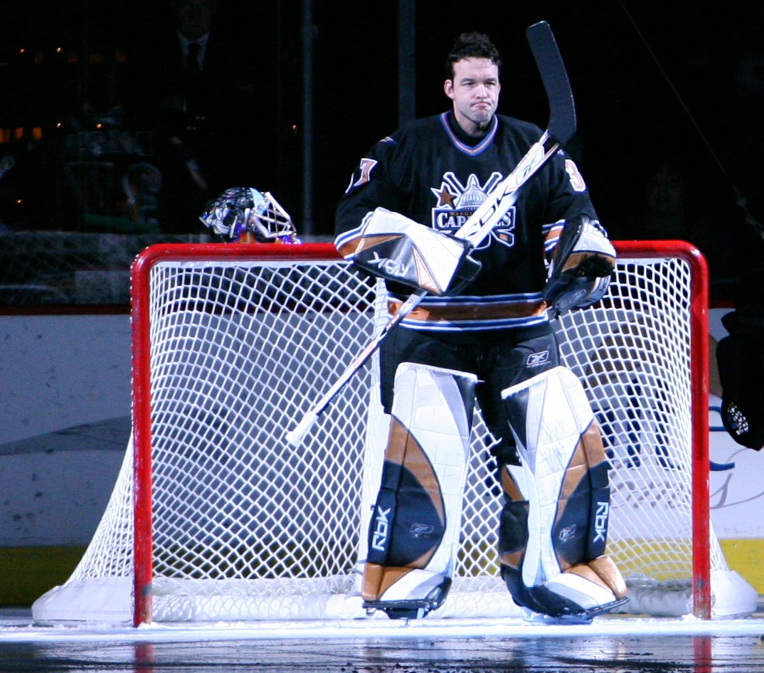 RO9A0493